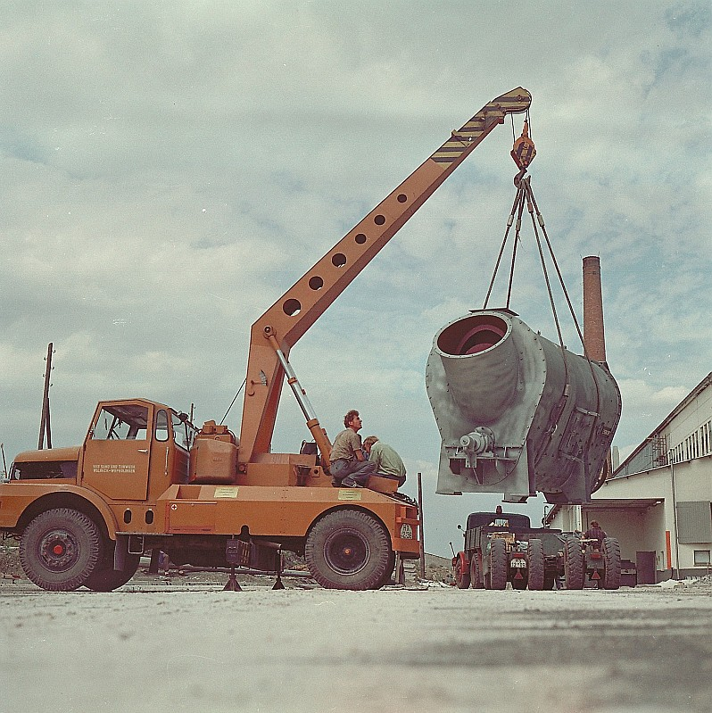 Original image description from the Deutsche Fotothek Facharbeiter für Glastechnik